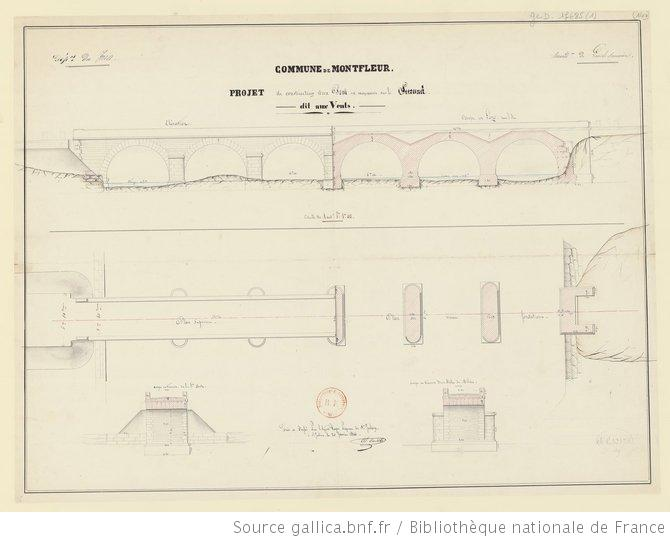 Dépt. du Jura. Arrondt de Lons-le-Saunier. Commune de Montfleur. Projet de construction d'un Pont en maçonnerie sur le Lurand, dit aux Vents. Echelle de 1 cm. = 1 m. [1 : 100 ]. Fait et / dressé par l'Agent-Voyer Piqueur Al. Ladot